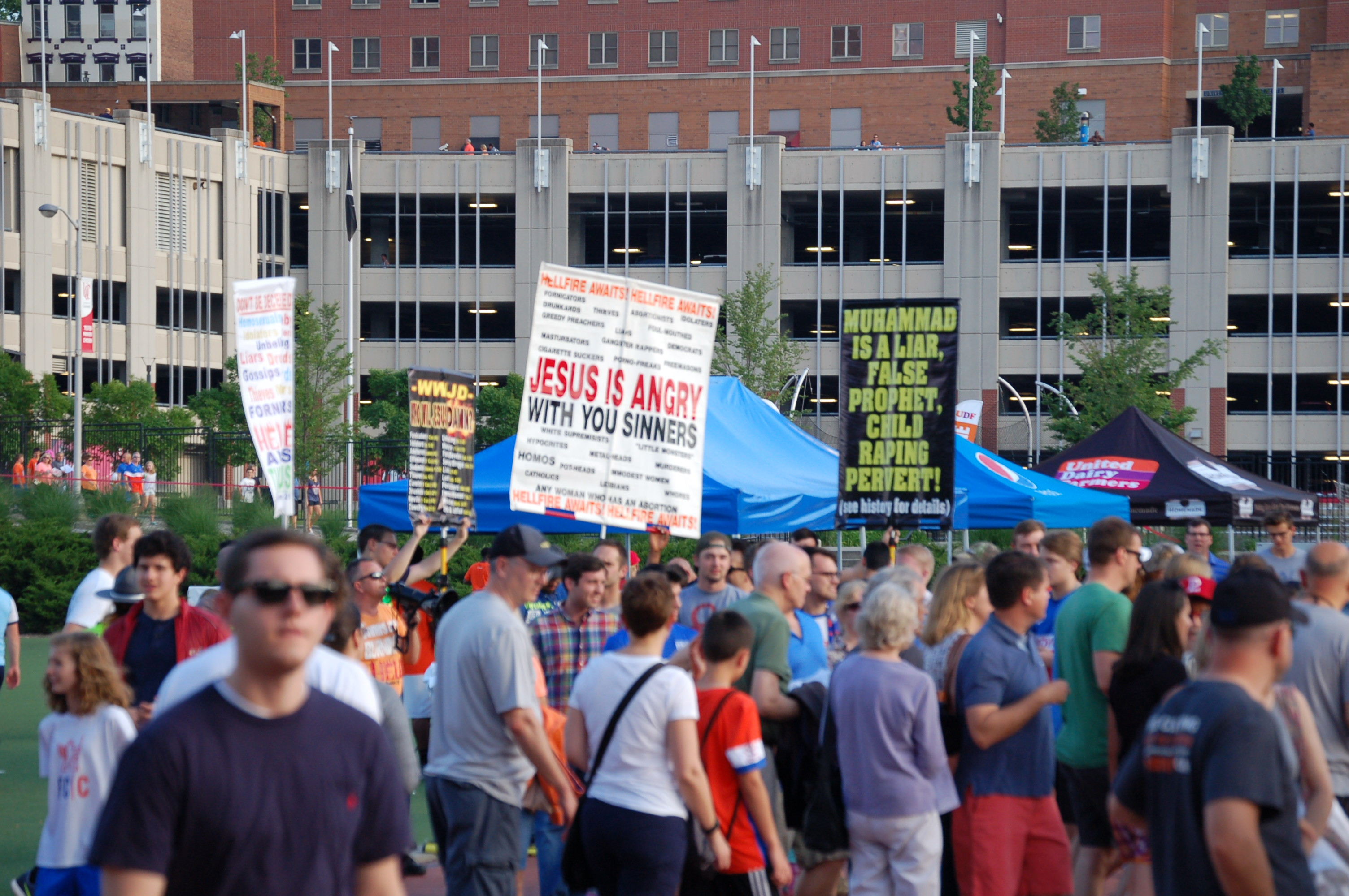 Anti-Muslim protestors